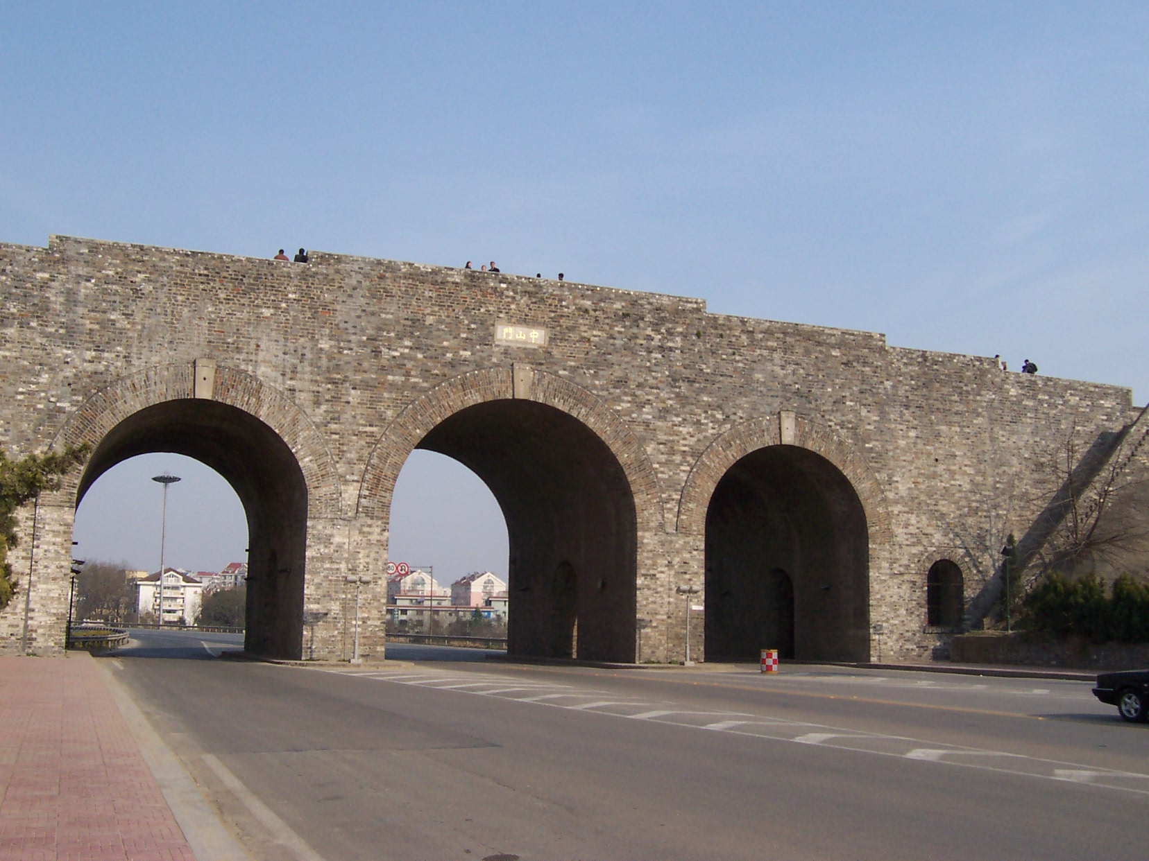 南京中山门 2004年拍摄